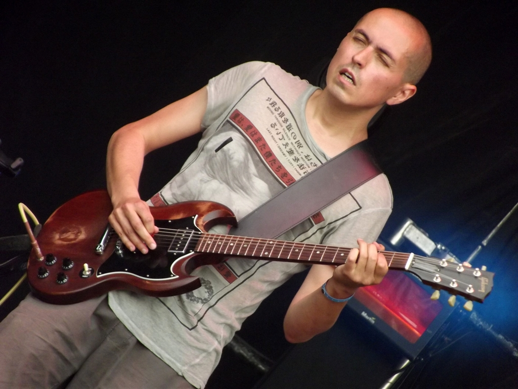 Zdjęcie zrobione podczas OFF Festival 2013 w katowickiej Dolinie Trzech Stawów.